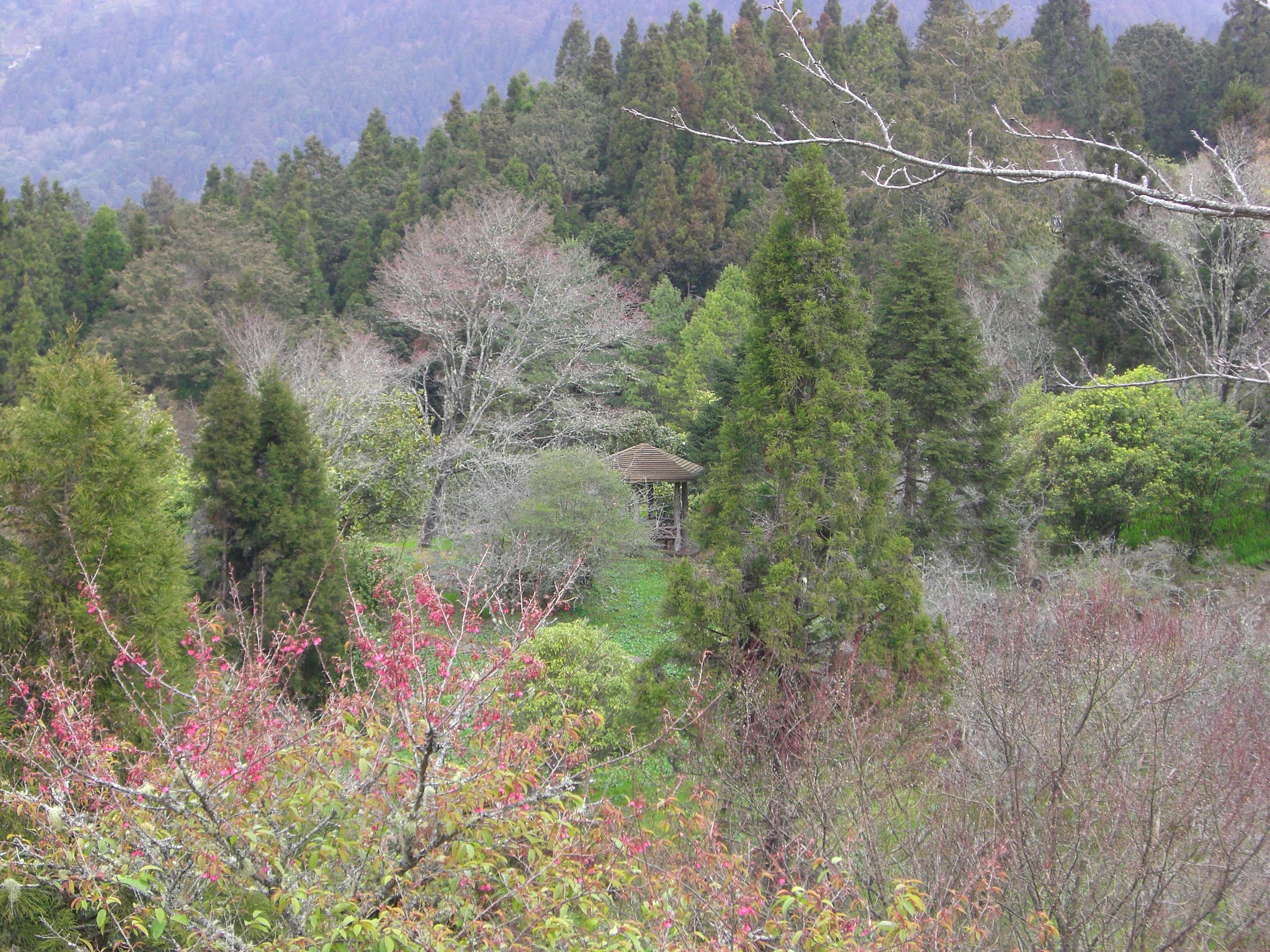 俯視沼平公園